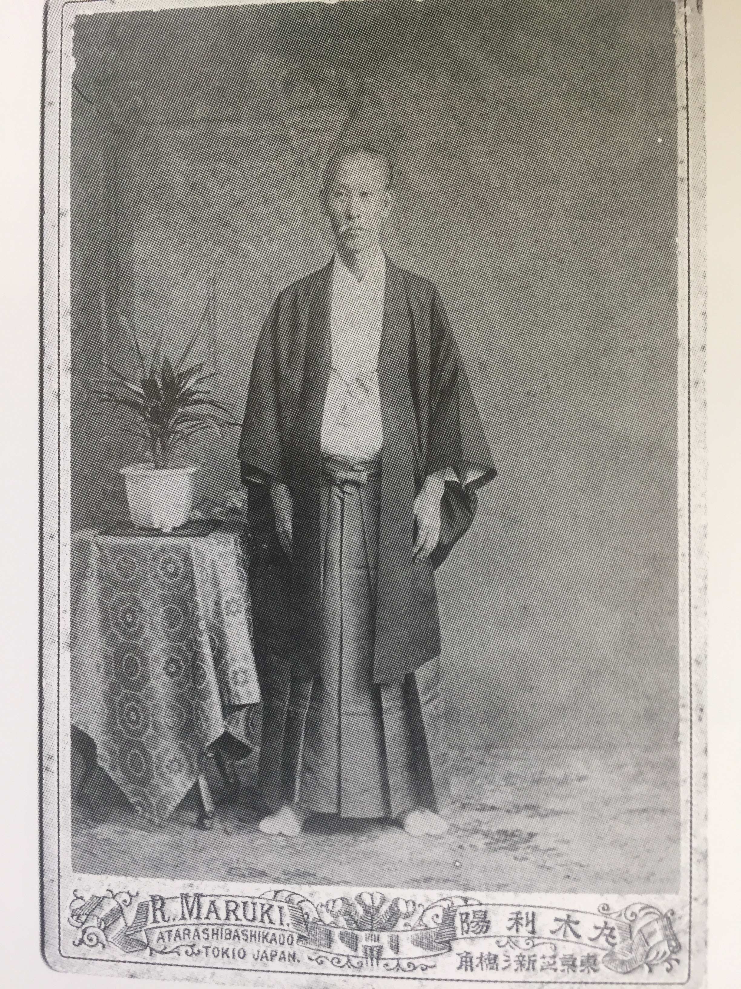 小野述信